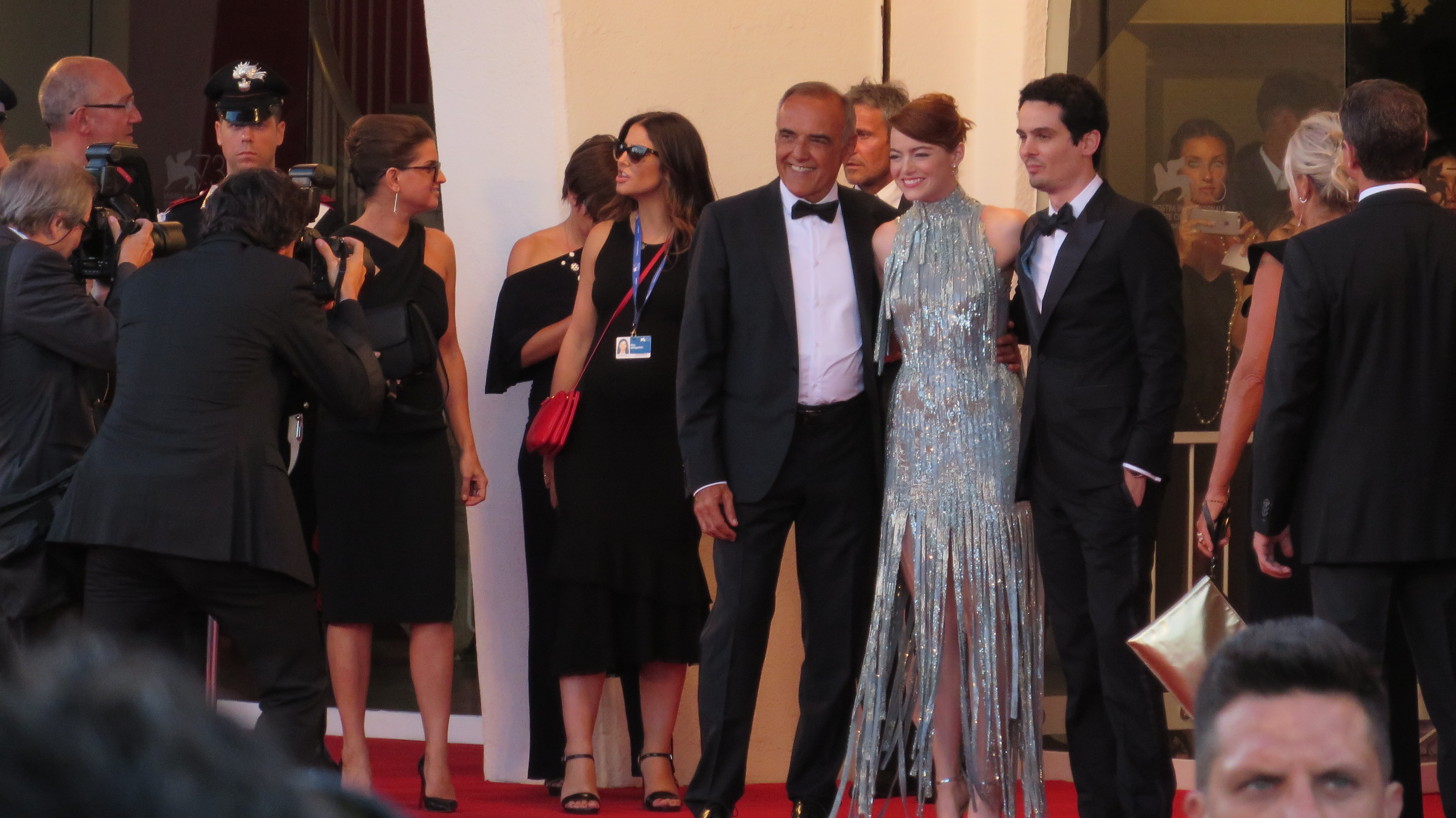 Emma Stone, Biennale di Venezia, Cinema - Film Festival